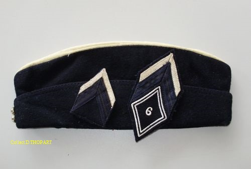 Bonnet de police et marques de grades d'un brigadier chef du 4eme escadron du 6e dragons à Besancon